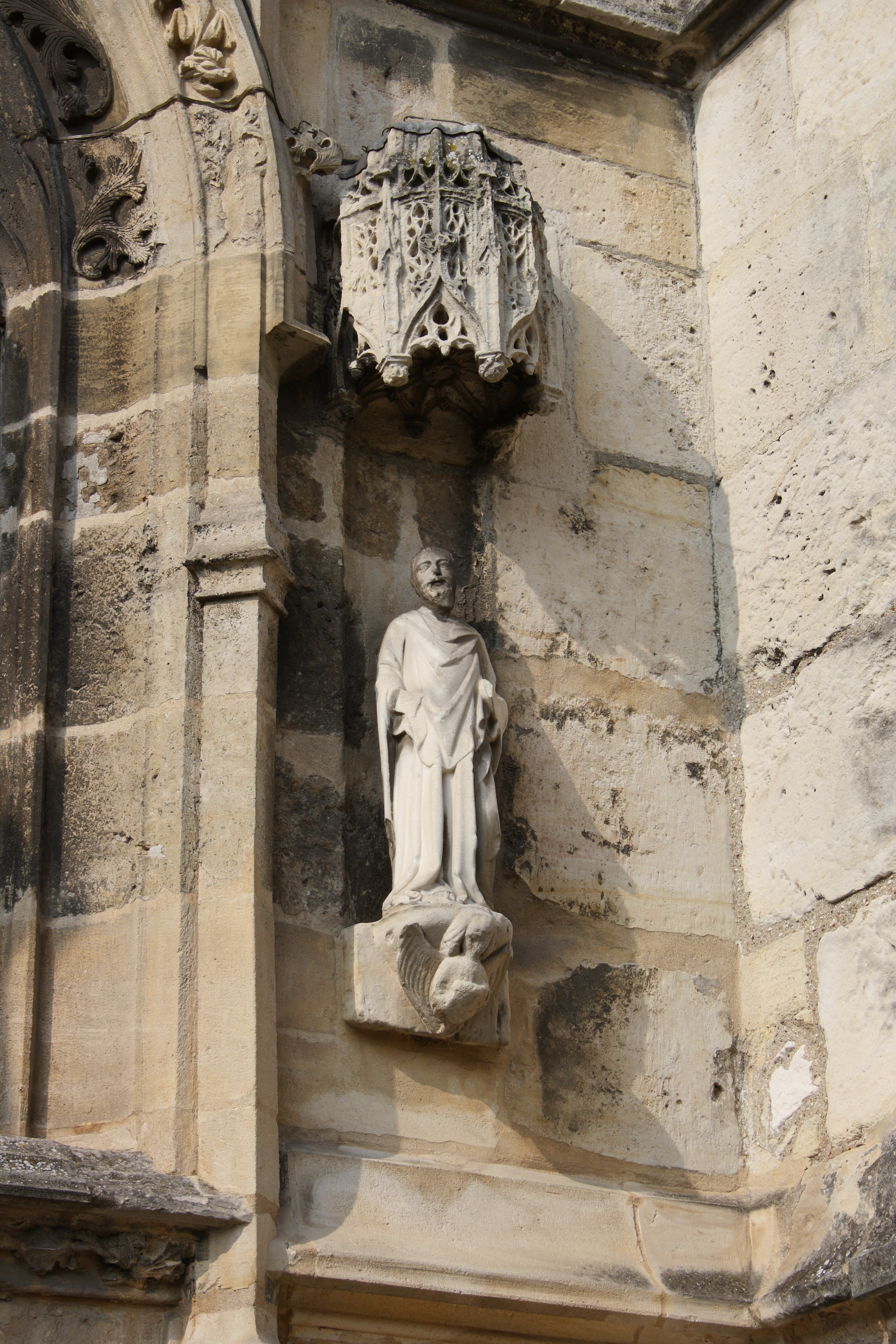 Kirche Saint-Pierre-et-Saint-Paul in Sarcelles